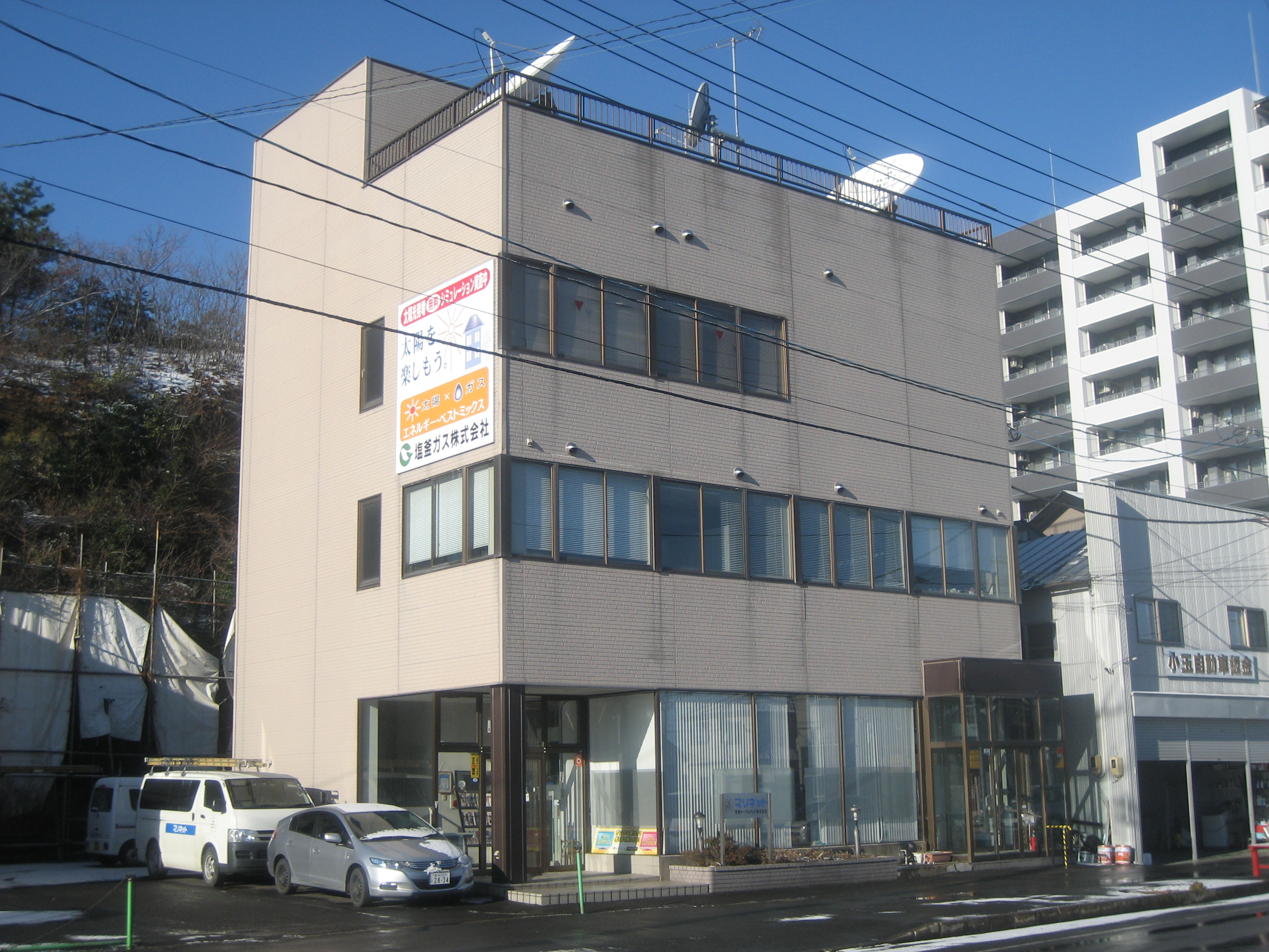 宮城県塩釜市にある宮城ケーブルテレビ（塩釜ケーブルテレビ）社屋